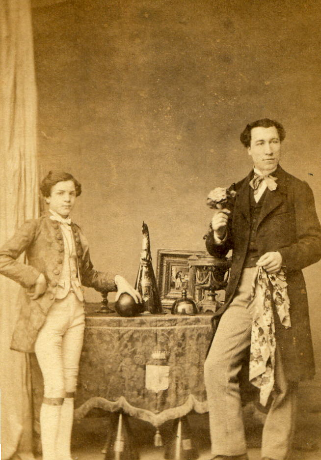 Anselme Bucher de Chauvigné, prestidigitateur (à droite).